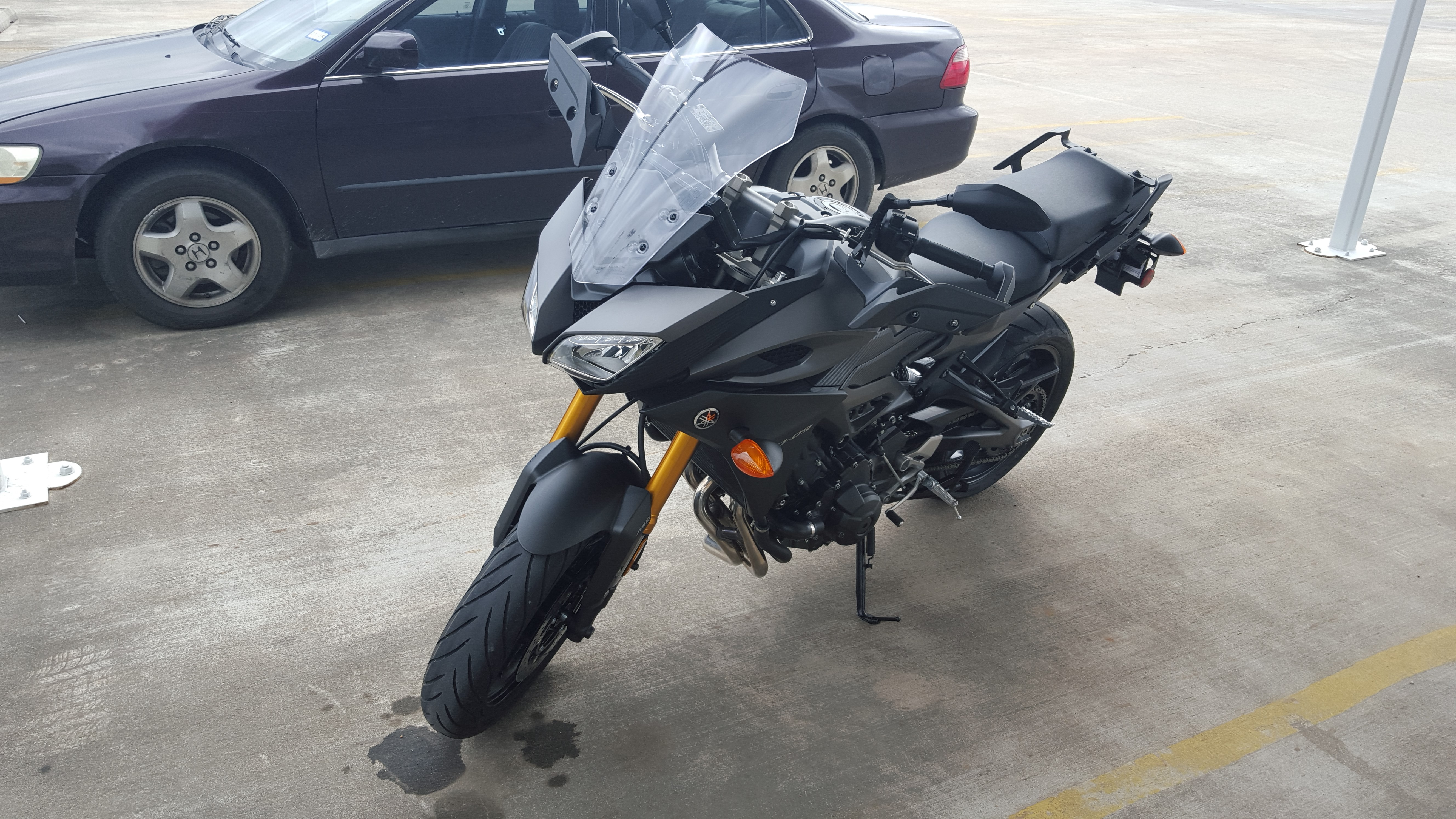 Motocicleta MT-09 Tracer (FJ-09 en EEUU)